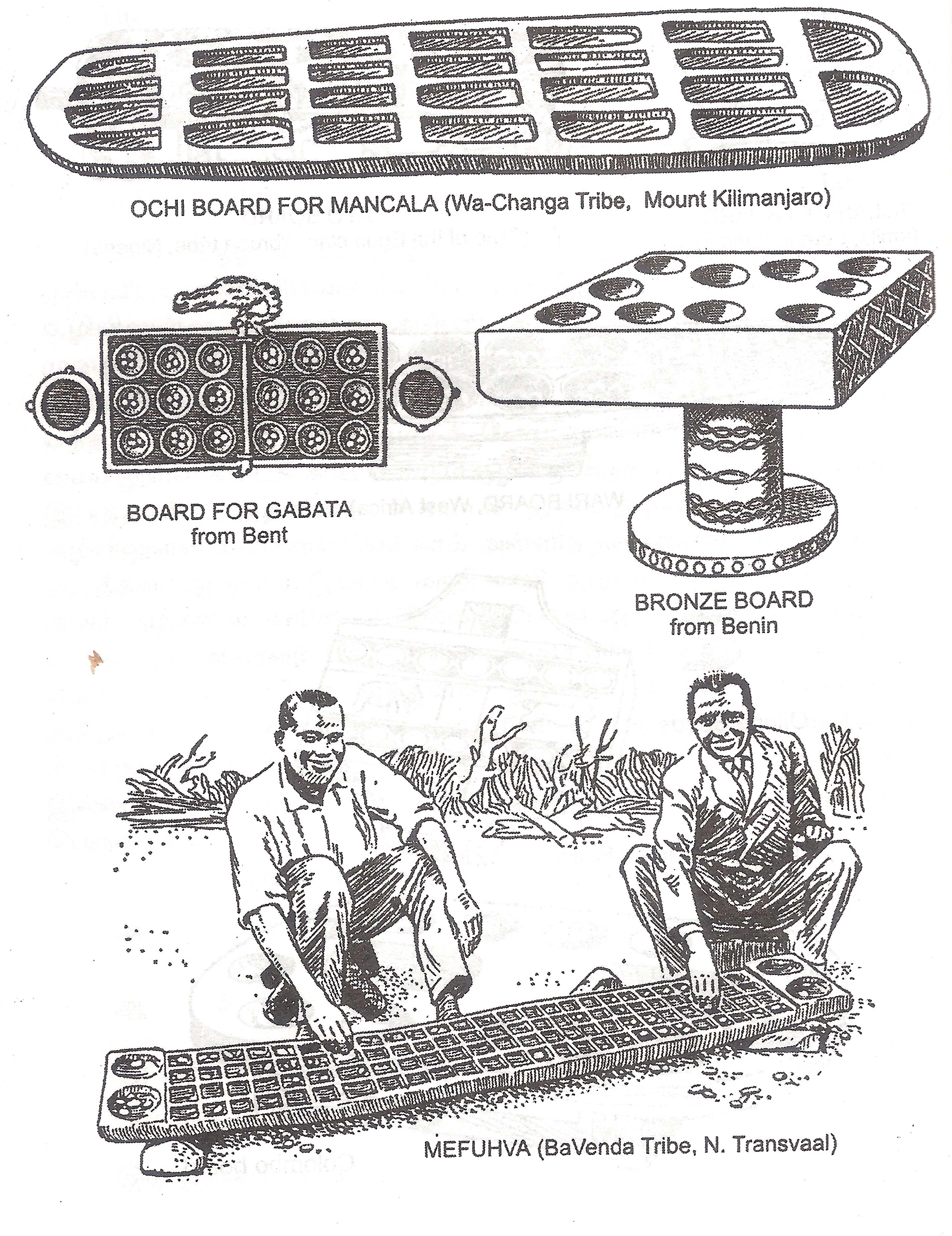 Game “Pallanguzi, பல்லாங்குழி, a board game, was played all over the world, in various boards, in various patterns. The image was taken from my own source, a book written by me, Vanishing-Game , Maraikindra Vilaiyaattugal. மறைகின்ற விளையாடுகள், 2002